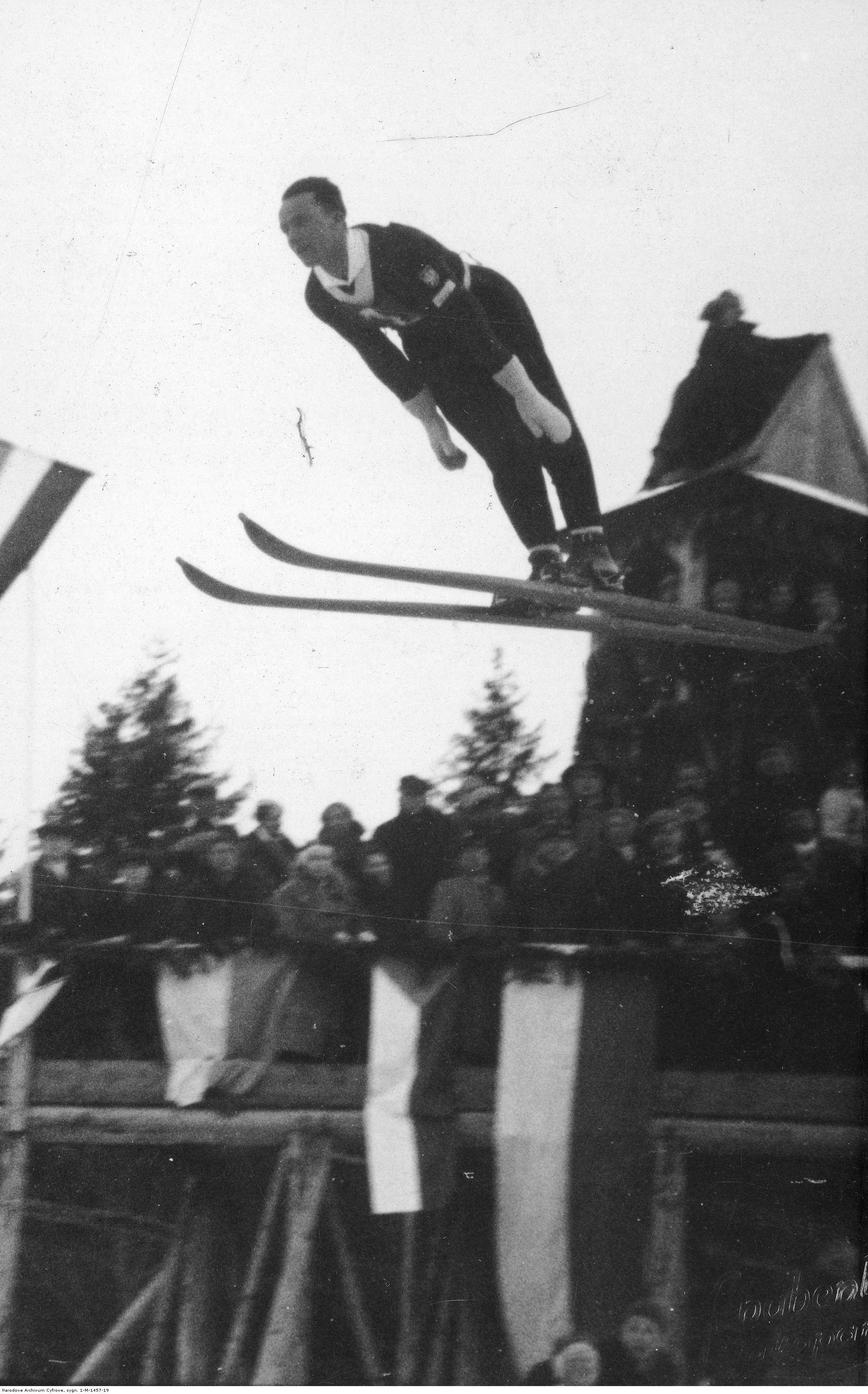 Międzynarodowe Zawody Narciarskie o Mistrzostwo Polski w Zakopanem. Bornisław Czech w skoku z Wielkiej Skoczni na Krokwi. 1934-02 (Koncern Ilustrowany Kurier Codzienny - Archiwum Ilustracji)